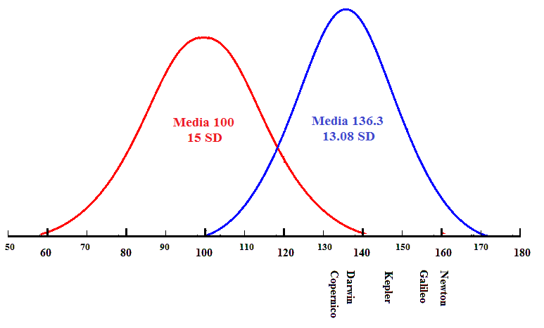 Curva gaussiana basada en los datos el libro 301 Genios de Catharine M. Cox de 1926 con las correcciones correspondientes del efecto de Flynn.